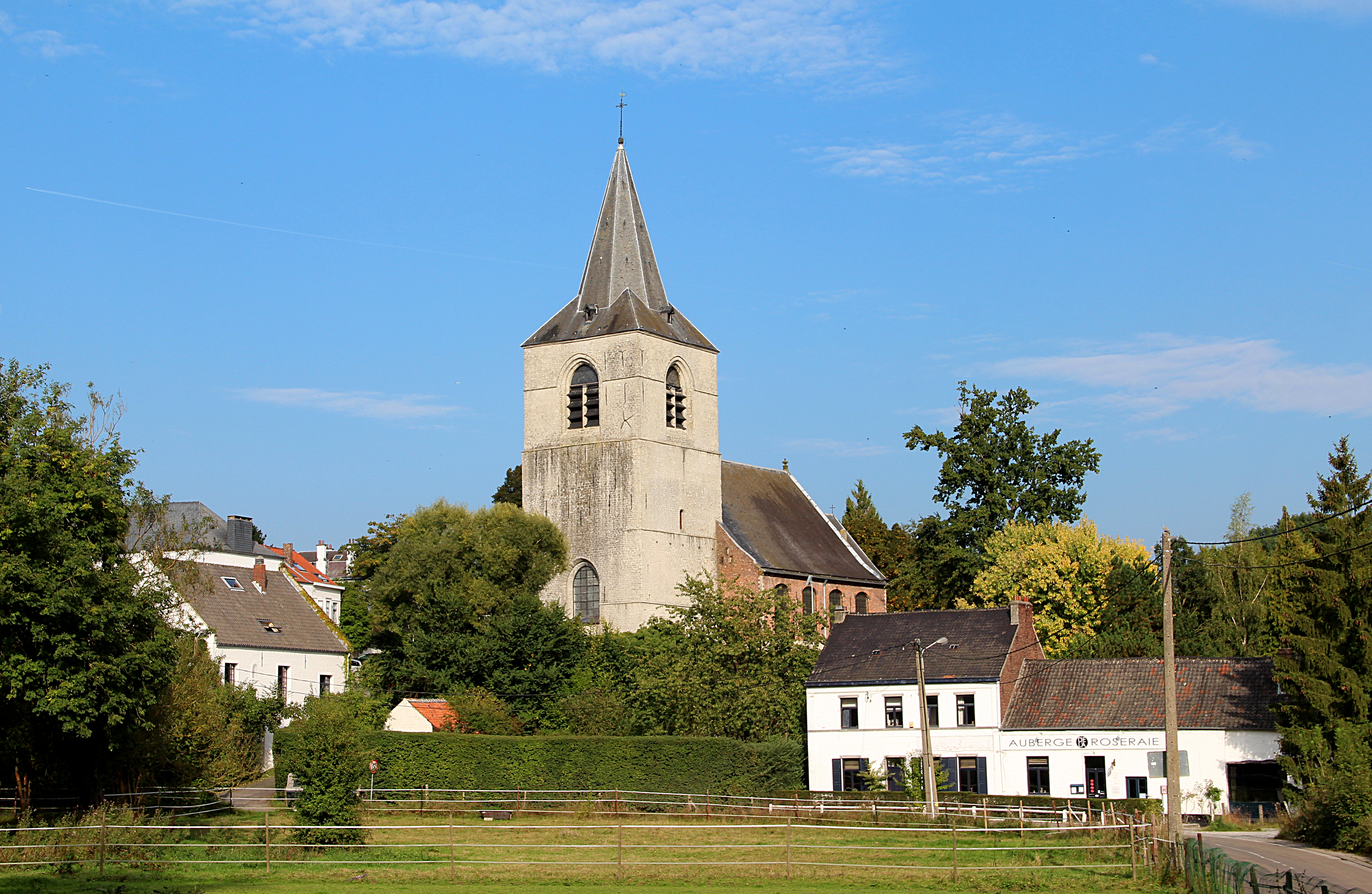 Ohain (Belgique), le quartier de l'église Saint-Etienne.